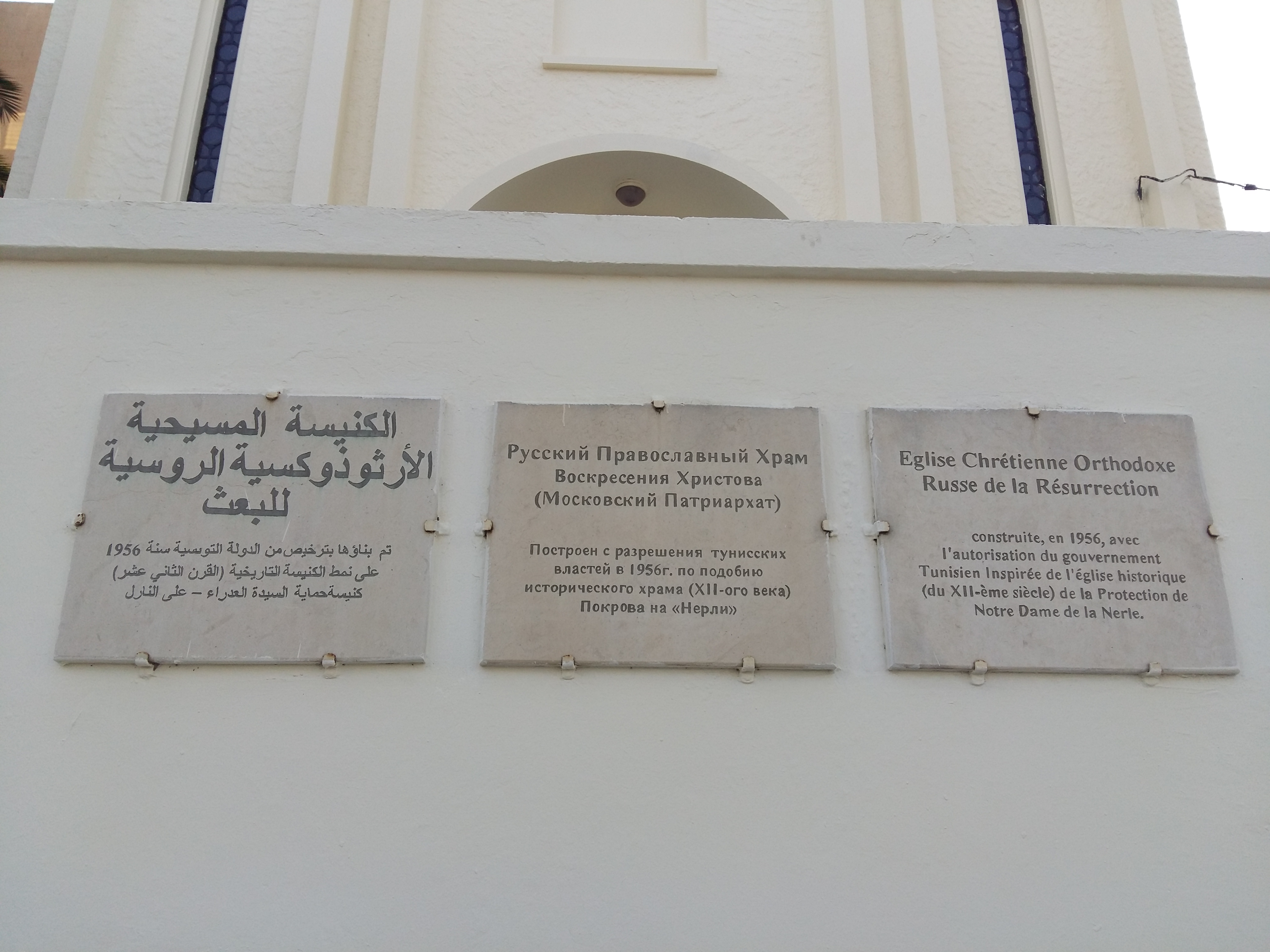 Tunis Eglise Russe